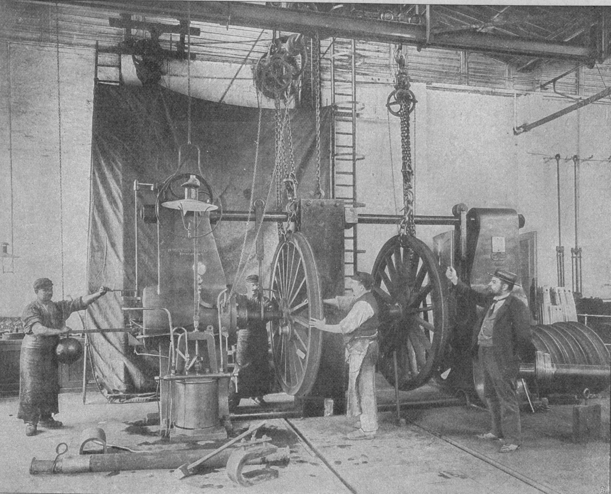 Bild aus Aufsatz: Im Reich des roten Zettels. Ein Gang durch die Reparaturwerkstatt der Eisenbahn.